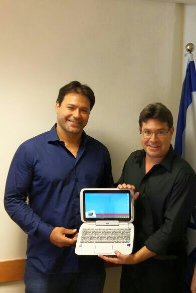 אופיר אקוניס, יו"ר המועצה הציבורית של פרוייקט "מחשב לכל ילד", מציג עם אריק זאבי את המחשבים שיחולקו לילדי דימונה ומגדל העמק